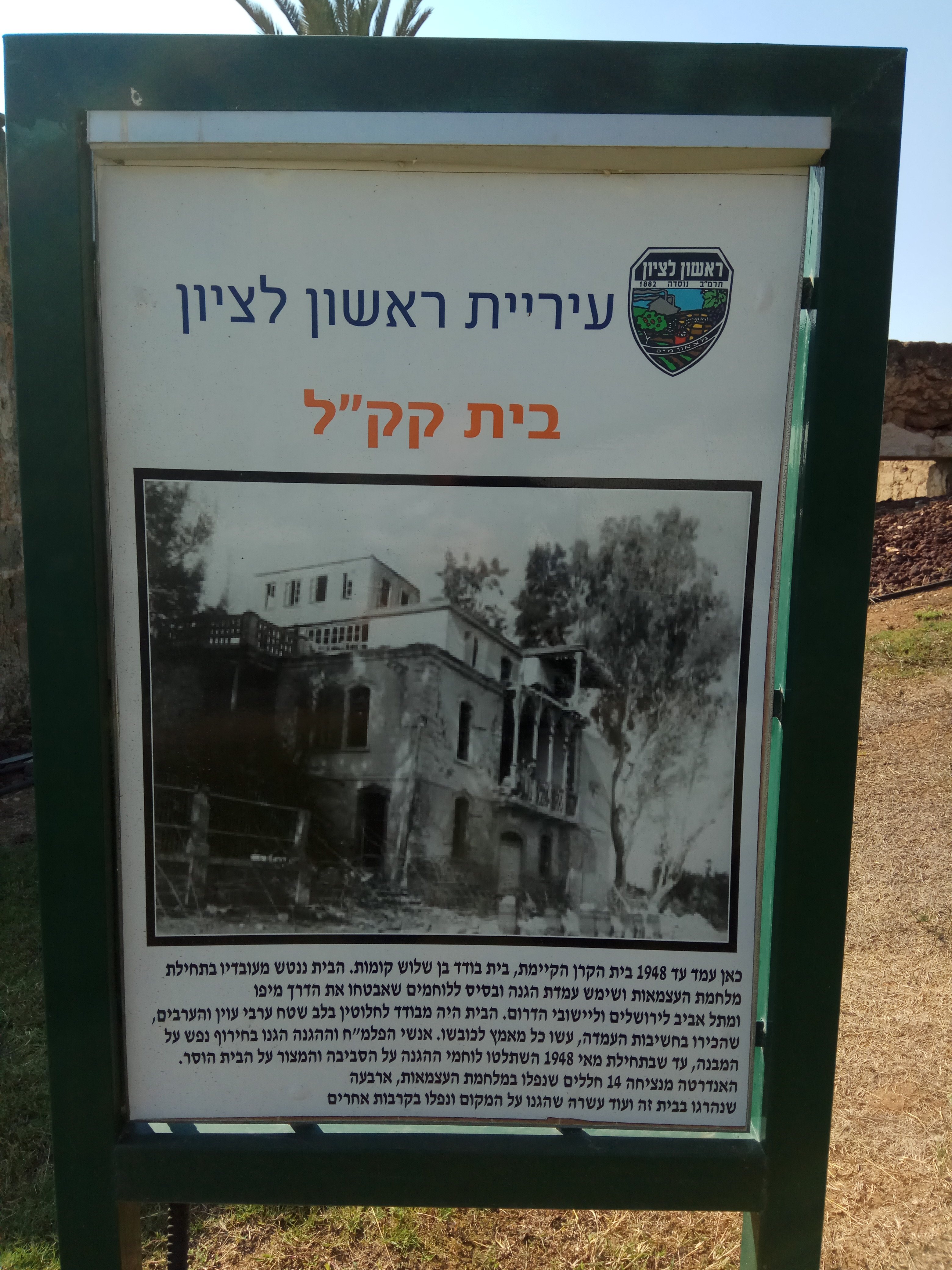 שלט הסבר בבית הקרן הקיימת בבית דגן